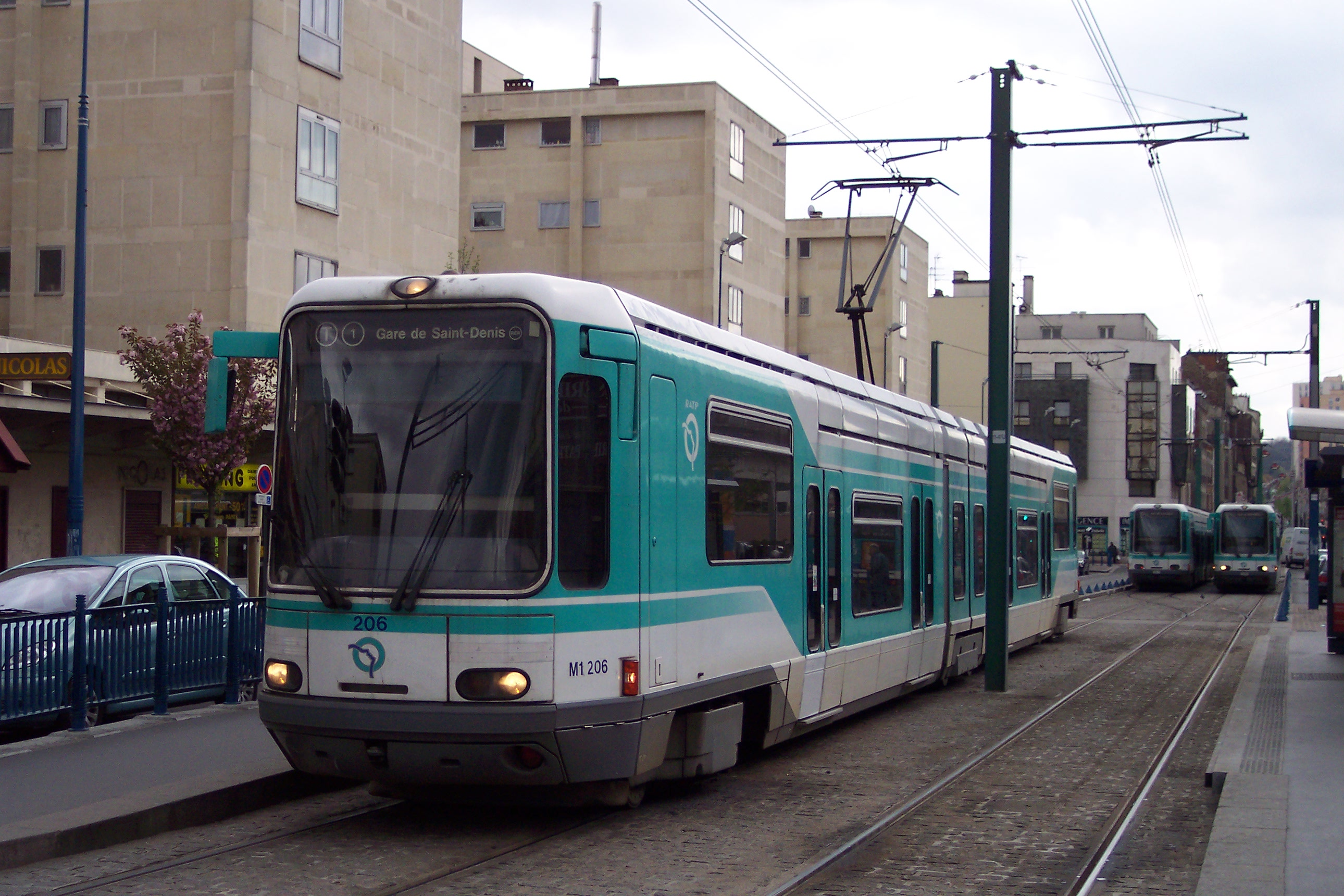 Straßenbahn in Paris Linie T1 (Gare de Noisy-le-Sec). Aufnahme vom 13.04.2005, Paris, Frankreich Source = Schachi